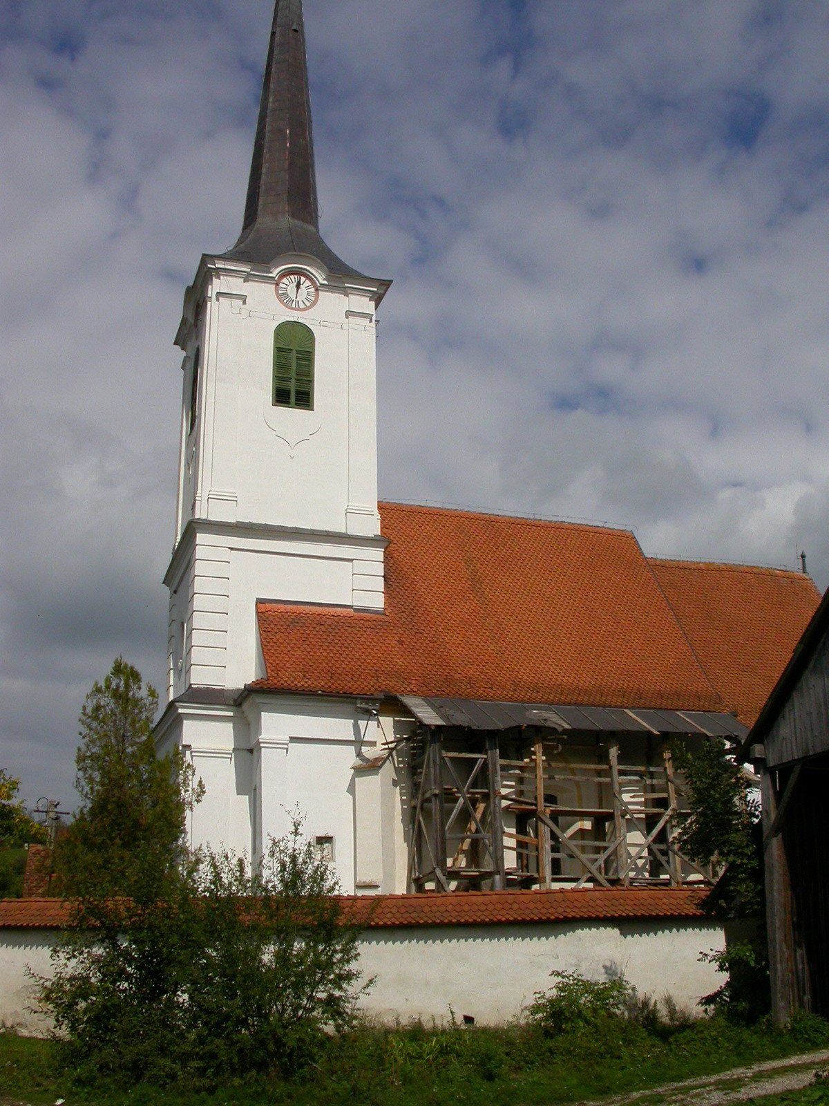 Ansamblul bisericii reformate, sec. XIV - XVIII